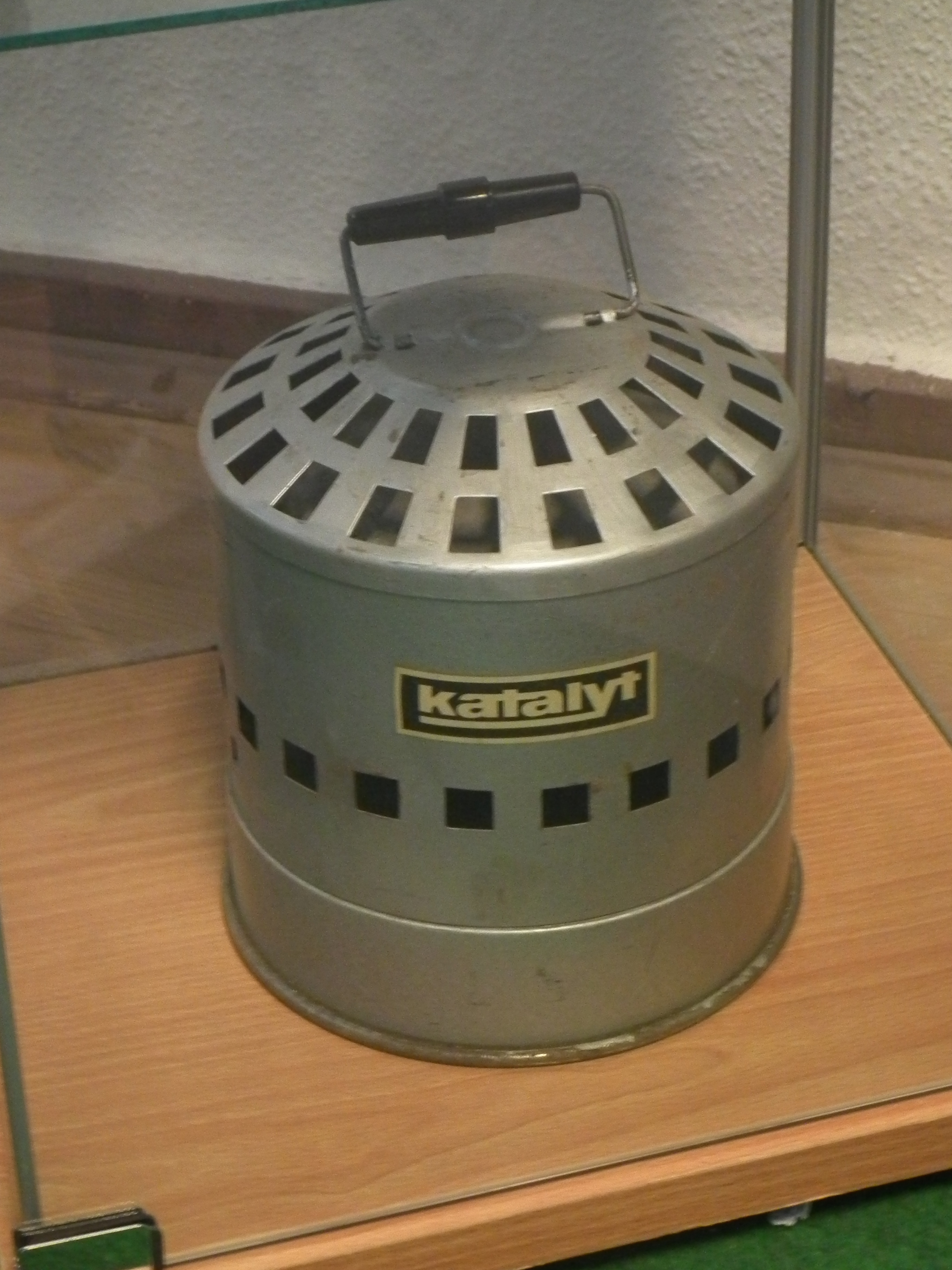 Katalytofen, DDR-Museum Pirna, Veröffentlicht mit Genehmigung der Museumsleitung